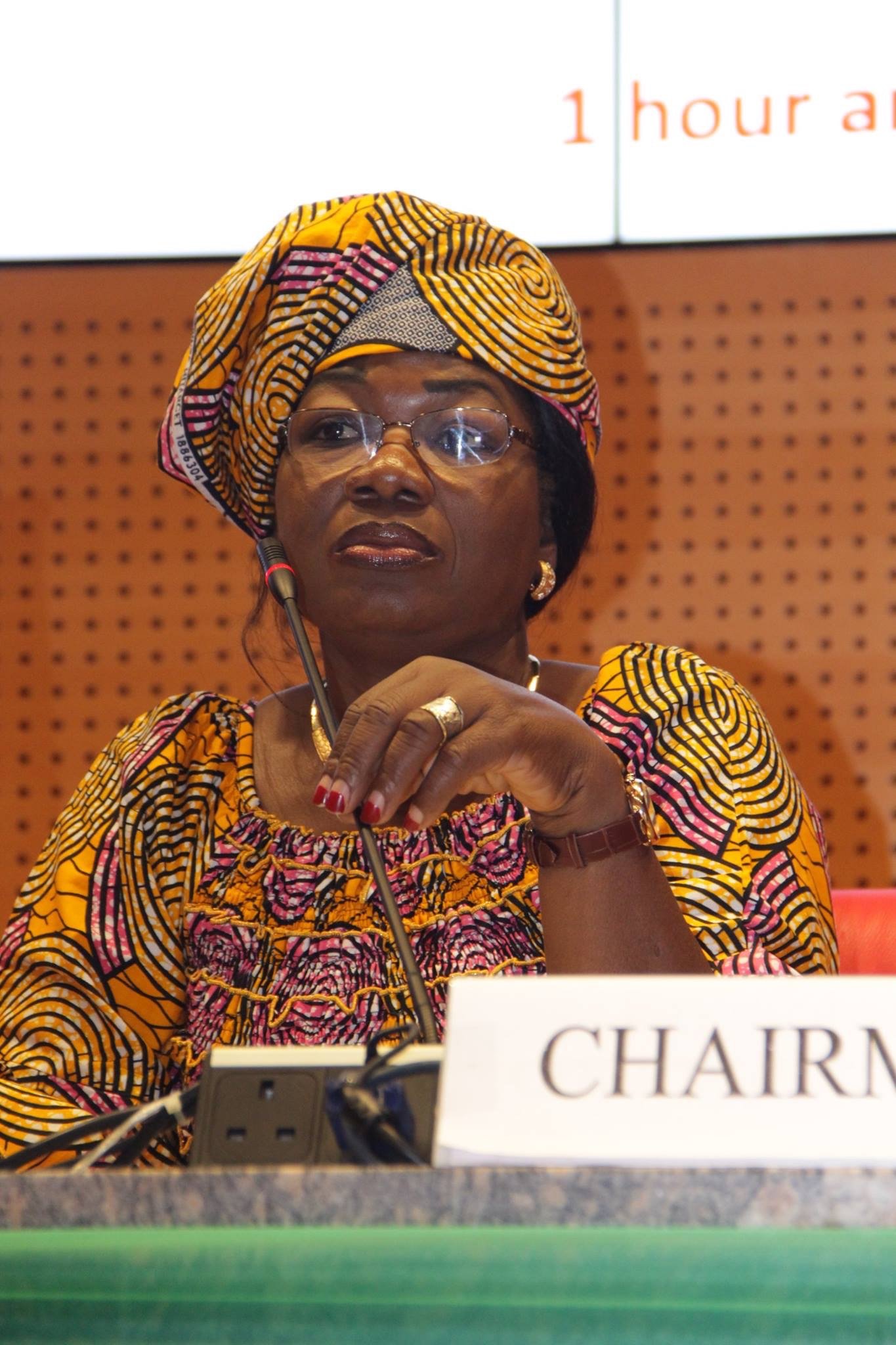 Au parlement de la CEDEAO